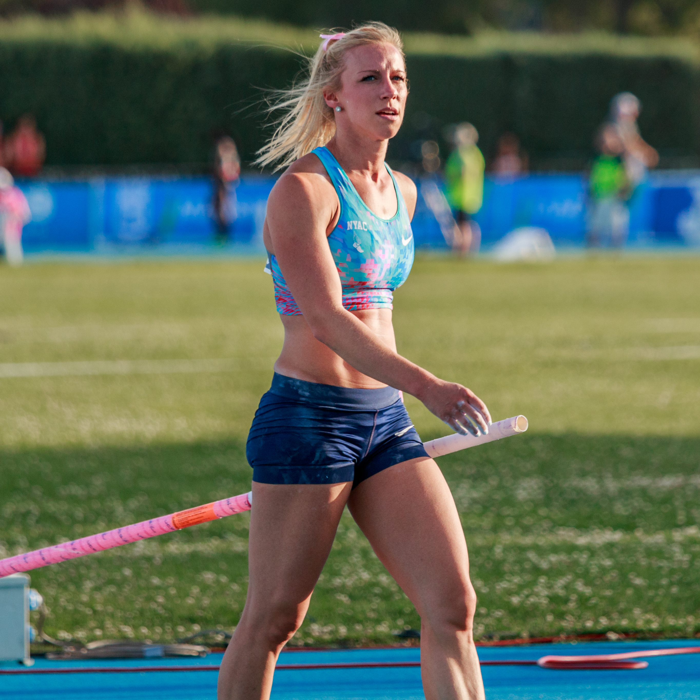 Mary Saxer (USA). Salto con garrocha. IAAF World Challenge. Meeting Madrid 2017. Moratalaz, Madrid.